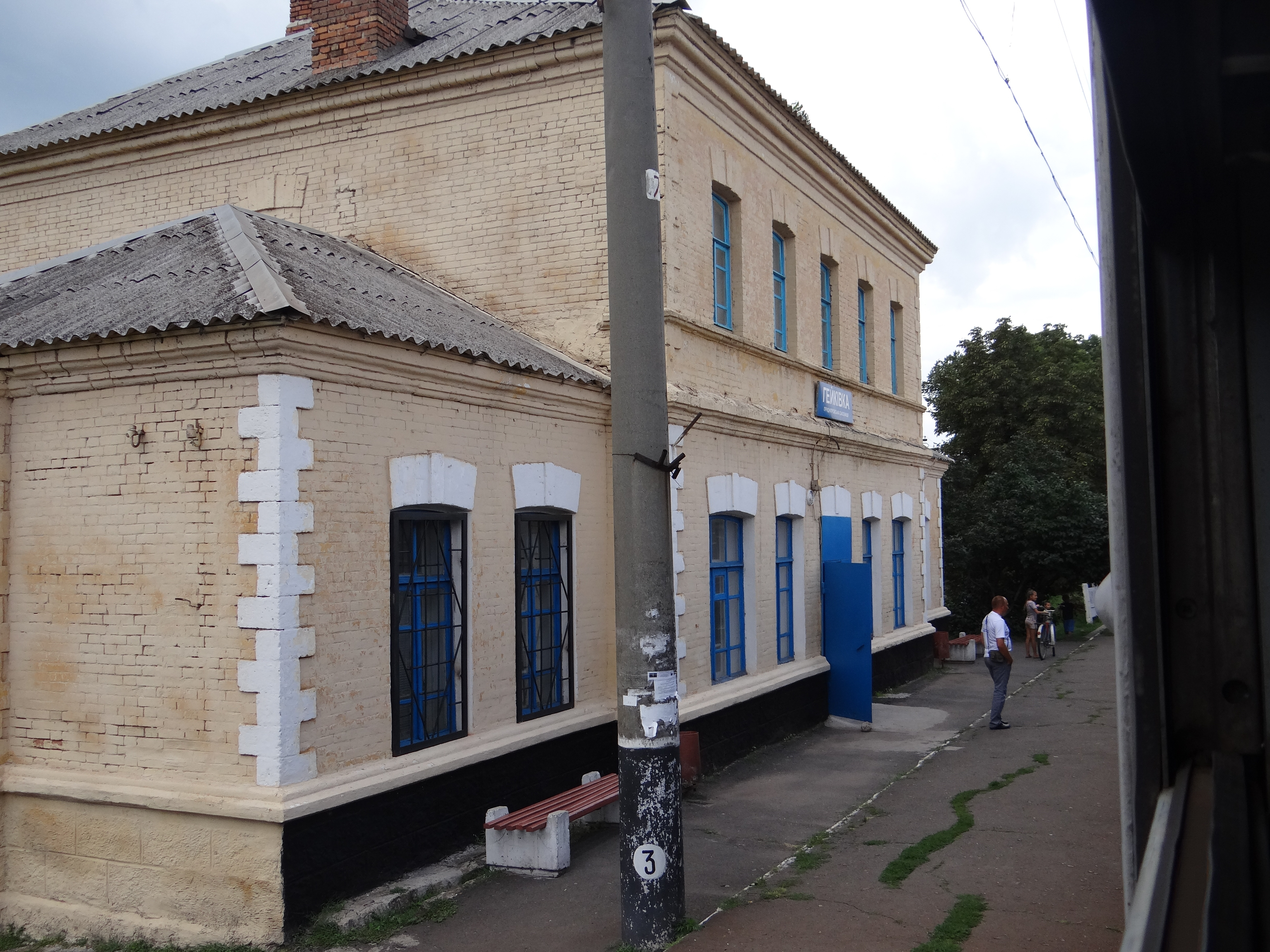 Гейківка